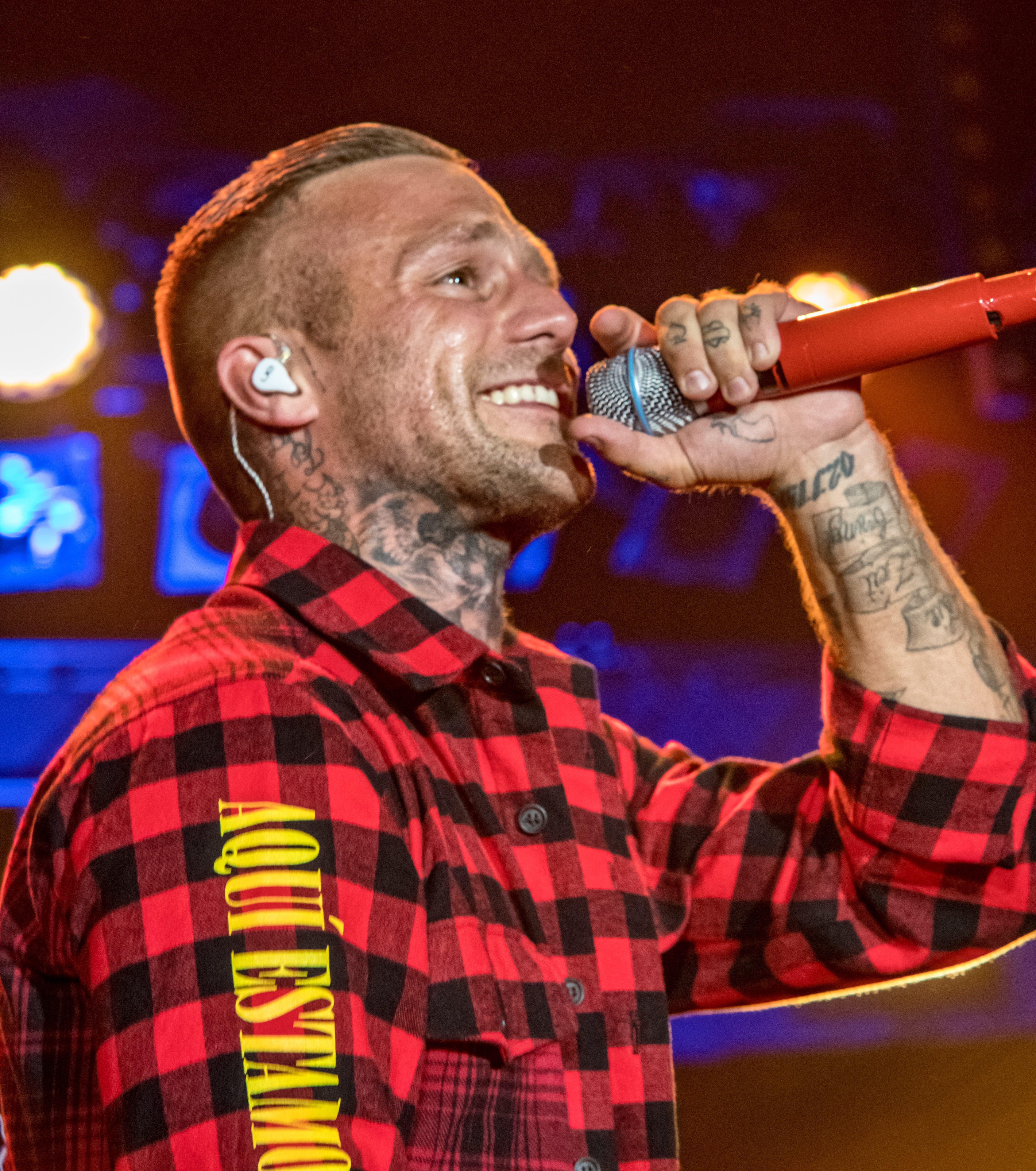 Bilder vom Zelt Musik Festival 2018 in Freiburg im Breisgau Kontra K am 27.07.2018 im Zirkuszelt